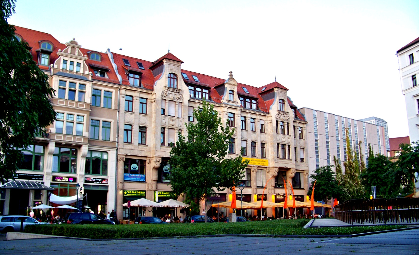 Gottschedstraße in Leipzig; rechts das Mahnmal in Erinnerung an die Novemberpogrome von 1938 am Standort der Alten Synagoge in Leipzig